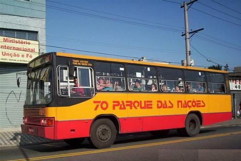 foto de um onibus na rua